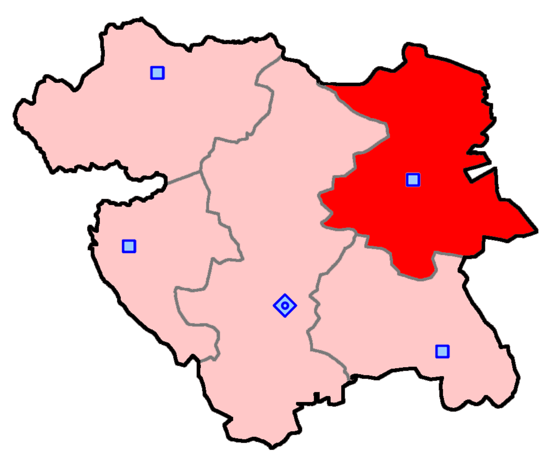 بیجار برای انتخابات مجلس شورای اسلامی